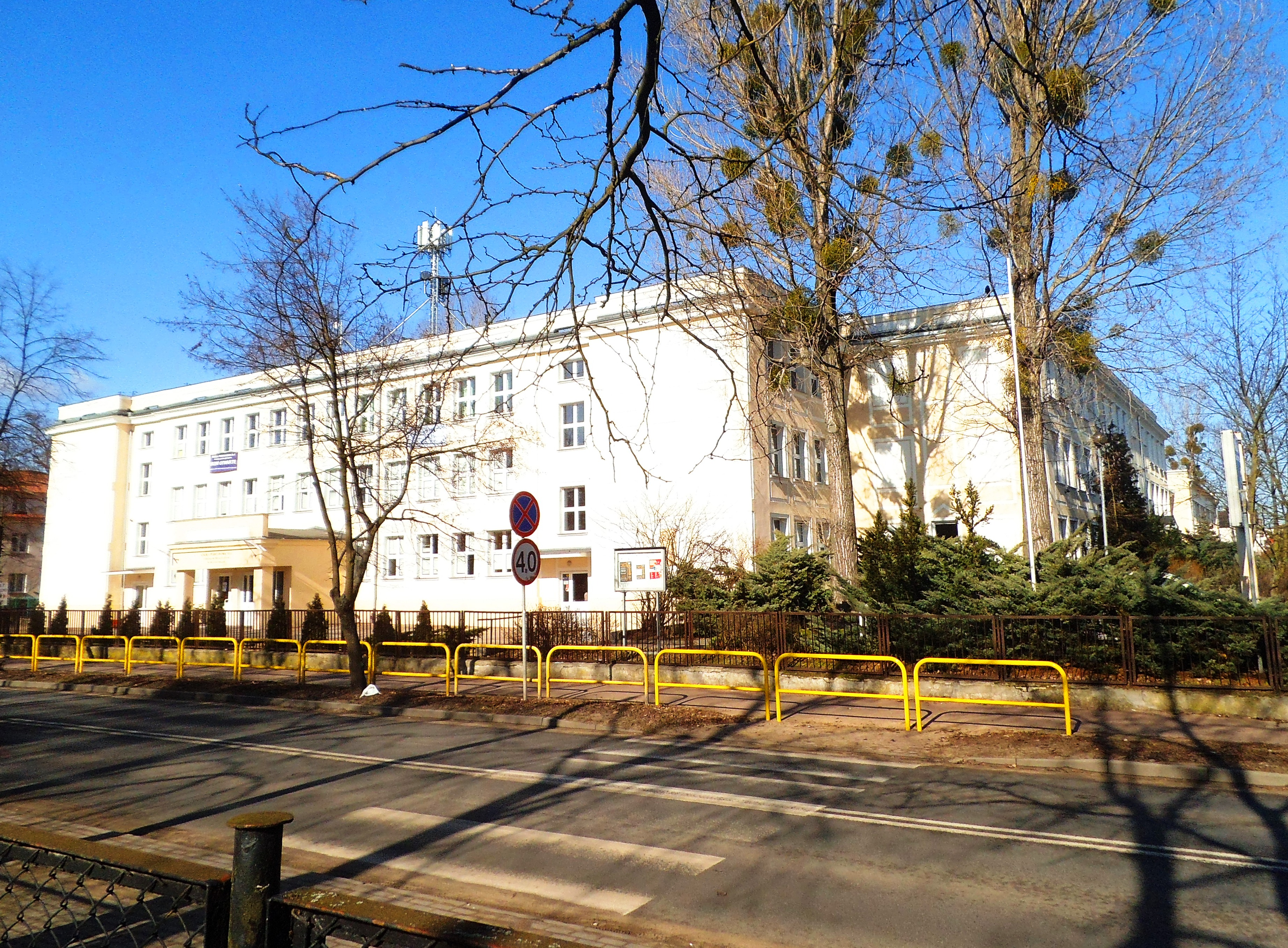 Szkoła Podstawowa nr 4 w Toruniu